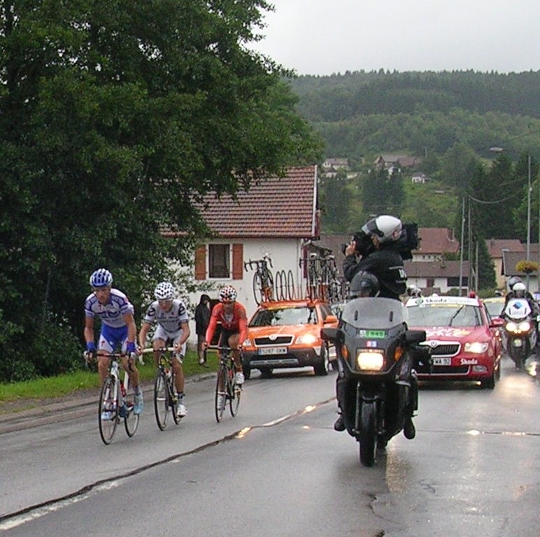 13ème étape du Tour de France 2009 Vittel-Colmar. Passage des trois échappés à Le Tholy sur la D 417 vers le km 79, dans l'ordre : Sylvain Chavanel, Heinrich Haussler et Ruben Perez.